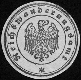 Sealing stamp Title: Reichswanderungsamt Description: Briefsiegel, weiß, schwarz Place: size: 3 cm